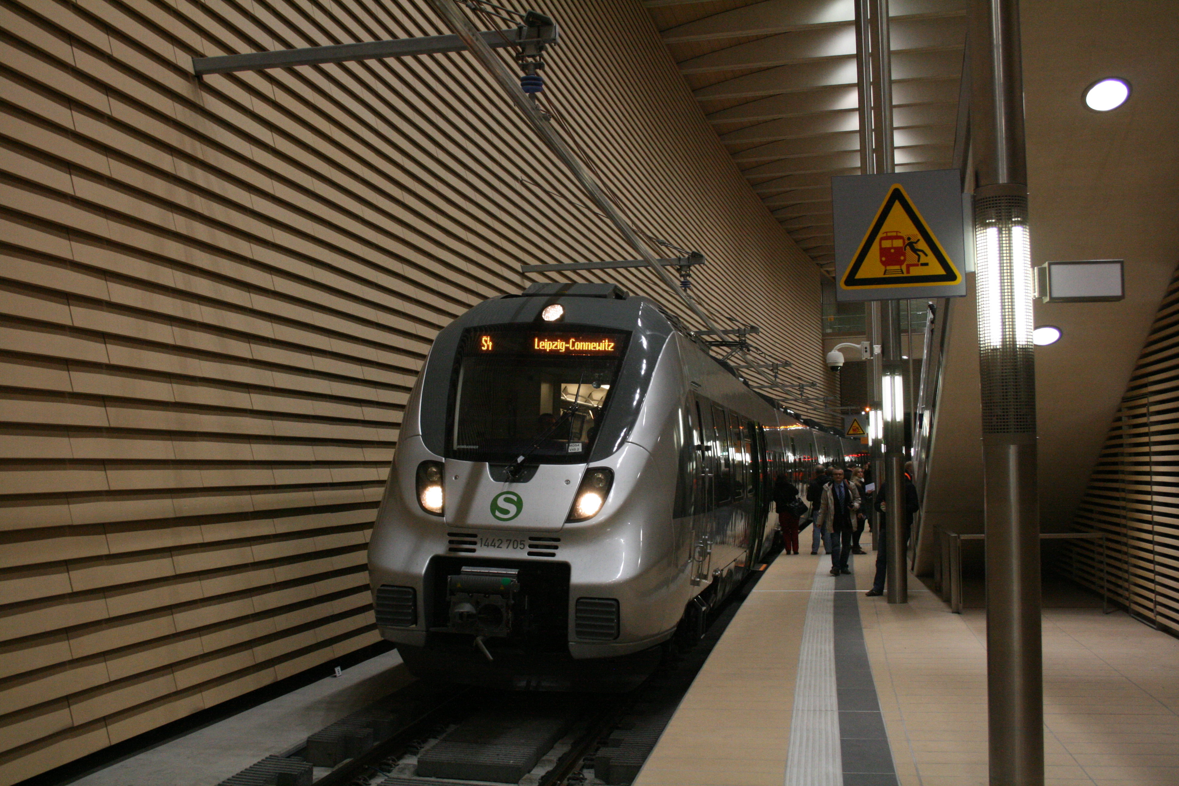 Triebwagen der Baureihe 442 zur Premierenfahrt in der Station Markt im Leipziger City-Tunnel